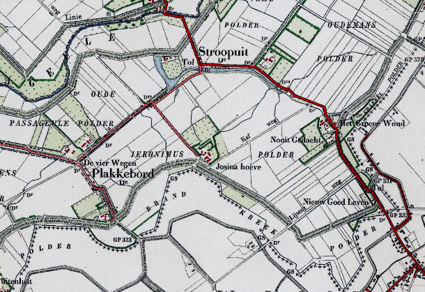 Jeronimuspolder